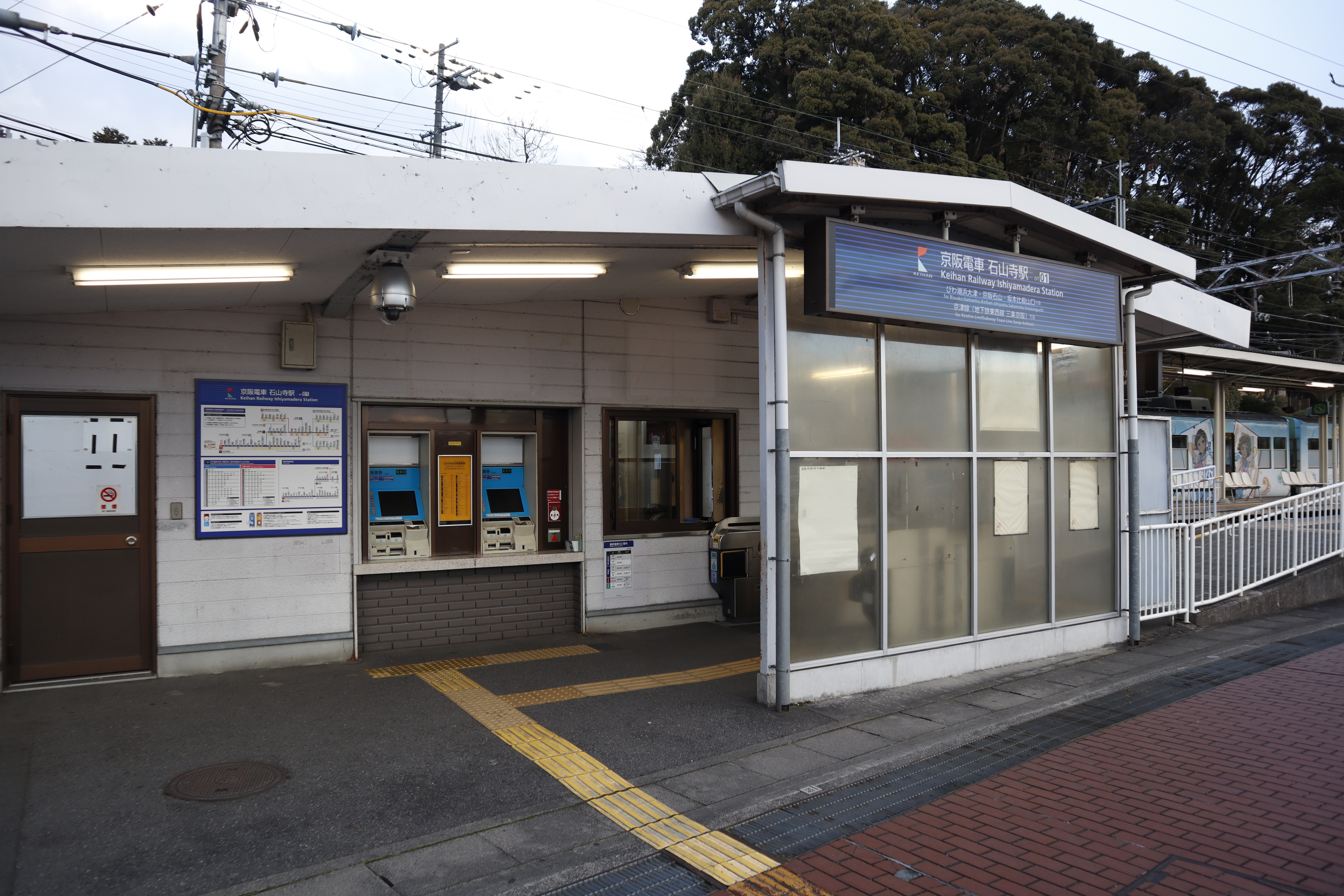 石山寺駅の駅舎